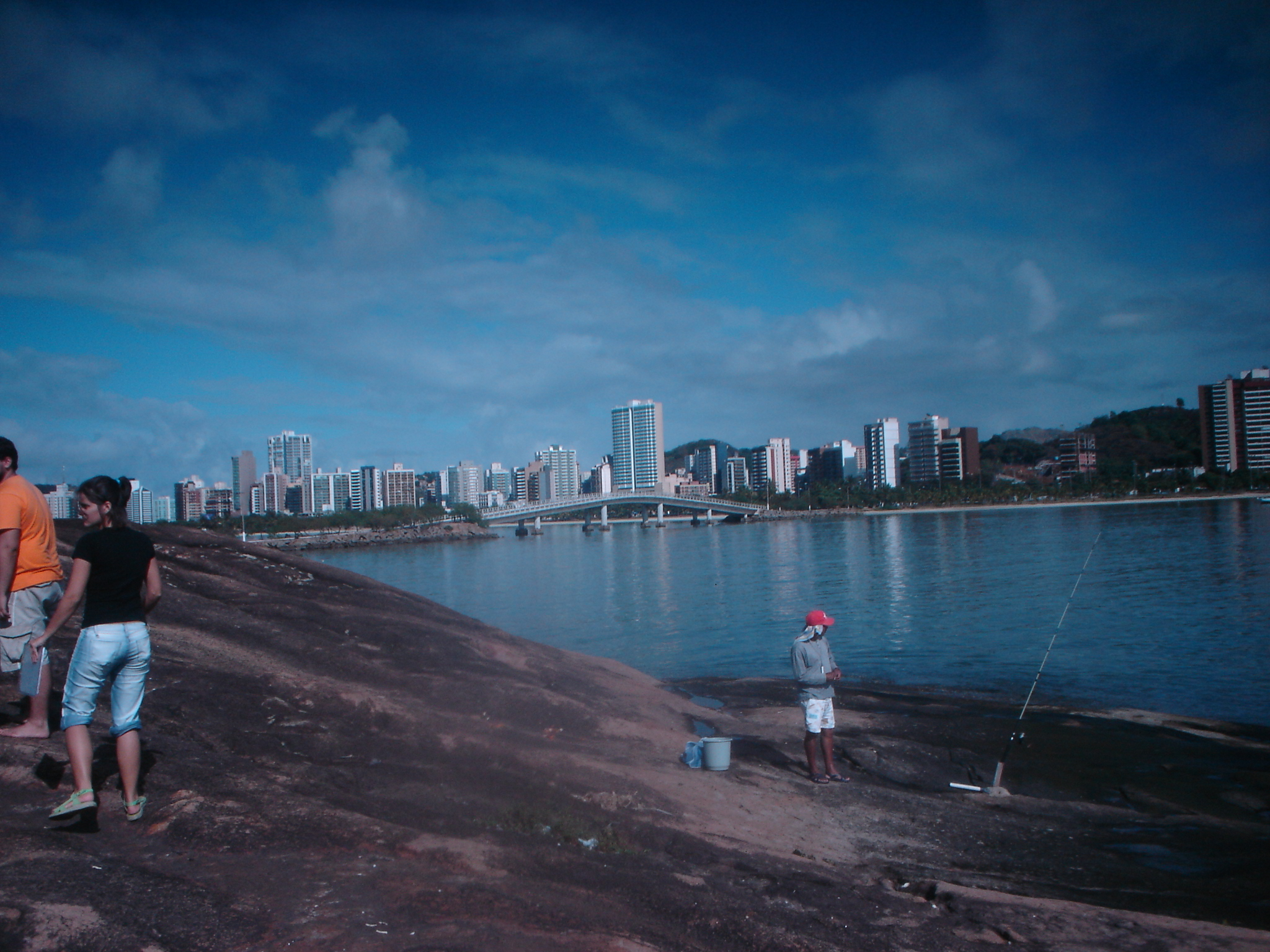 Vitória/ES, Brasil